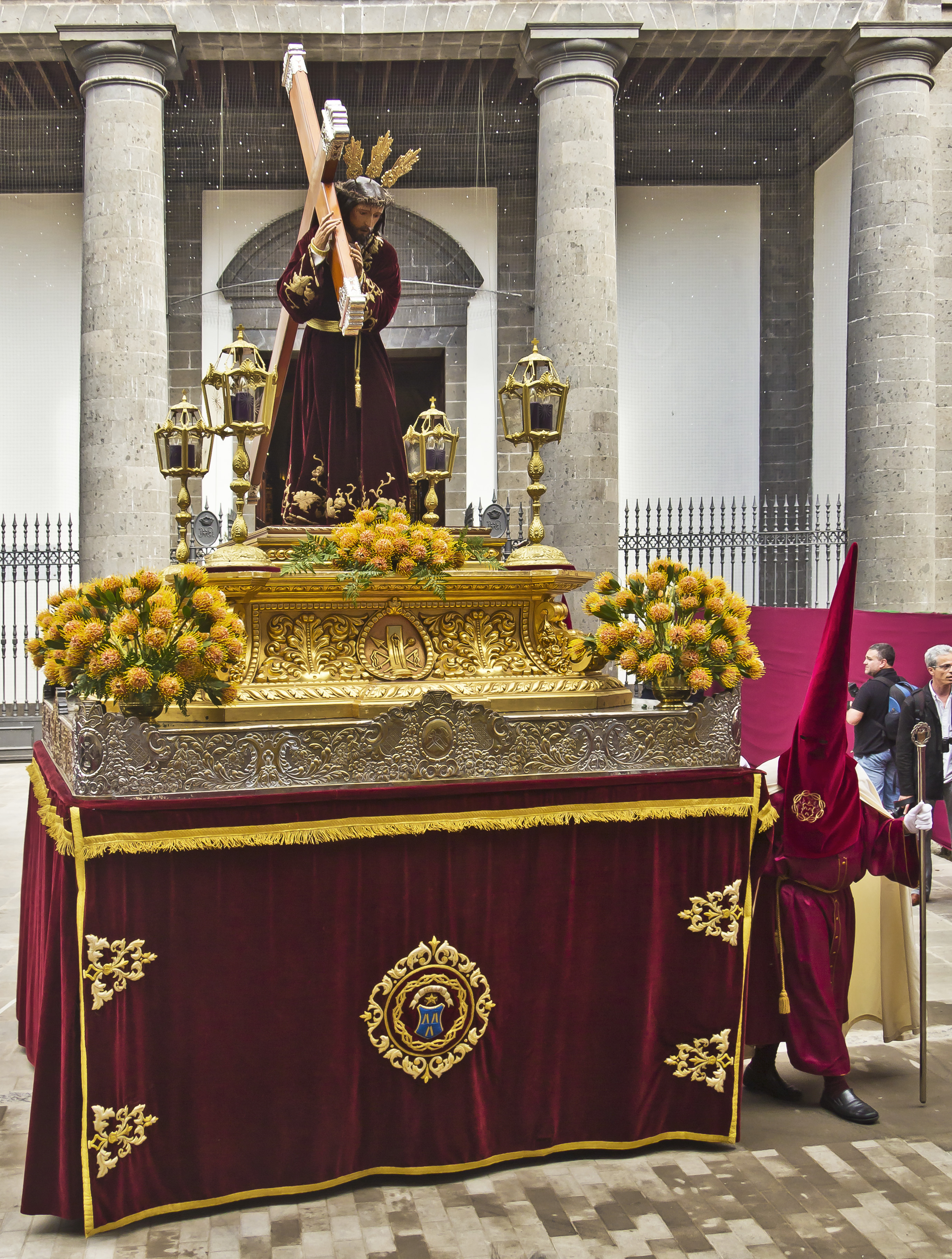 Paso de Nuestro Padre Jesús Nazareno